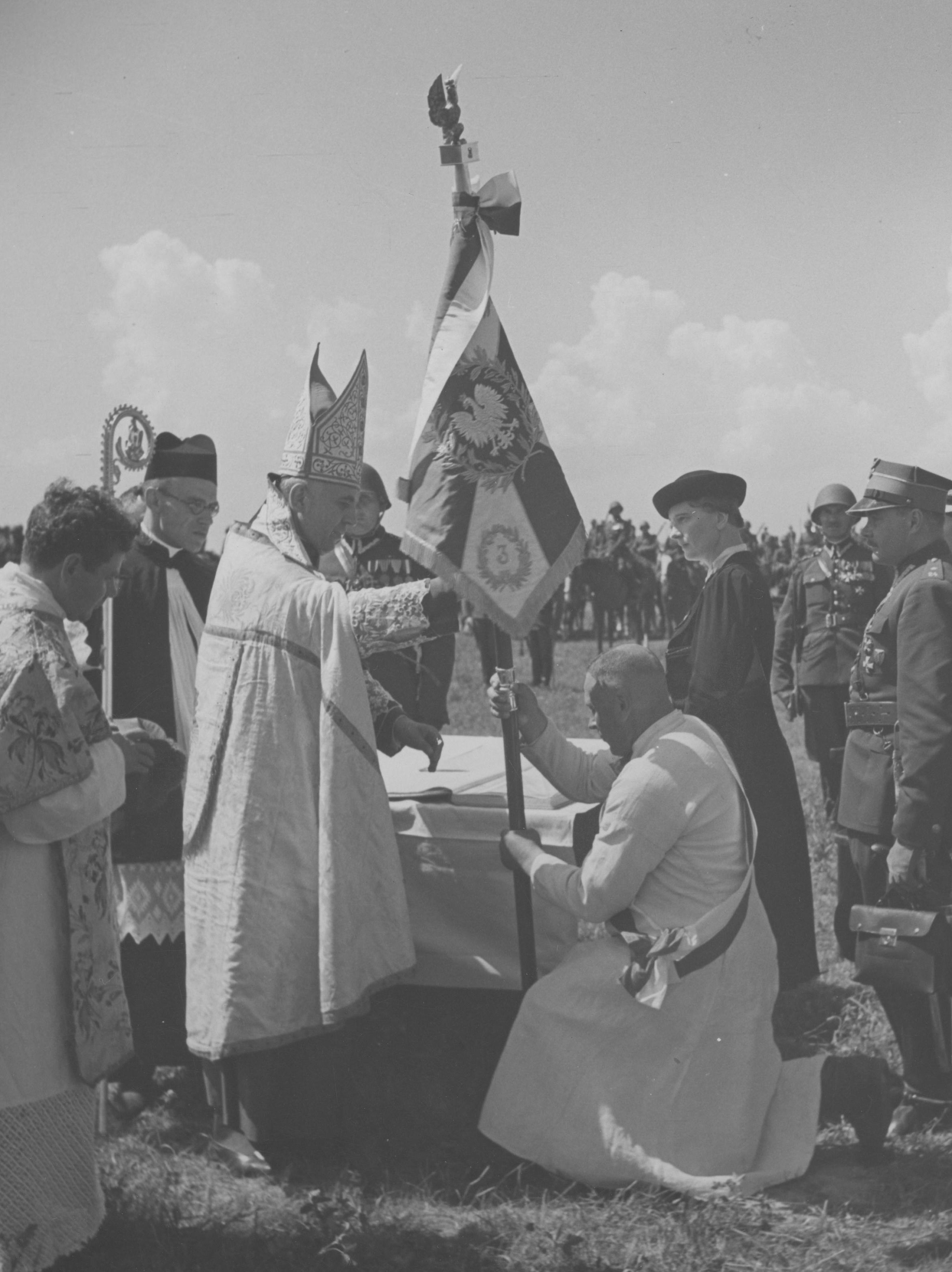 Wręczanie sztandaru 3 Pułkowi Artylerii Lekkiej Legionów w Zamościu, ufundowanego przez mieszkańców Zamościa. Biskup polowy WP Józef Gawlina wręcza sztandar 3 Pułku Artylerii Lekkiej Legionów rodzicom chrzestnym; lipiec 1938 r. Koncern Ilustrowany Kurier Codzienny - Archiwum Ilustracji. Sygnatura: 1-W-3121-2